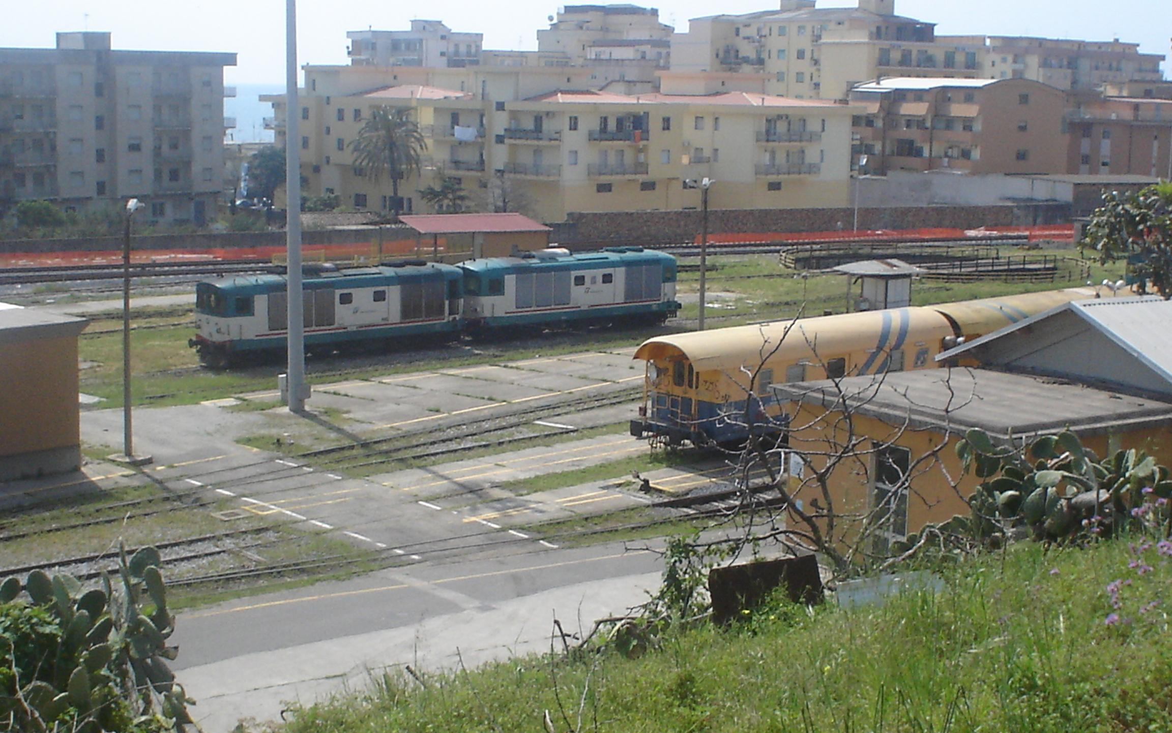 Uno scorcio del Deposito Locomotive di Catanzaro Lido